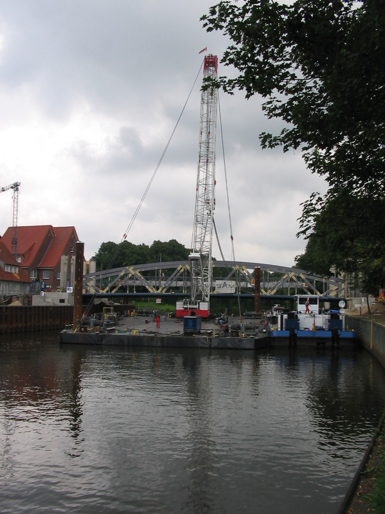 Einsetzen der neuen Hubbrücke